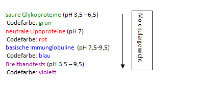 Proteingruppen